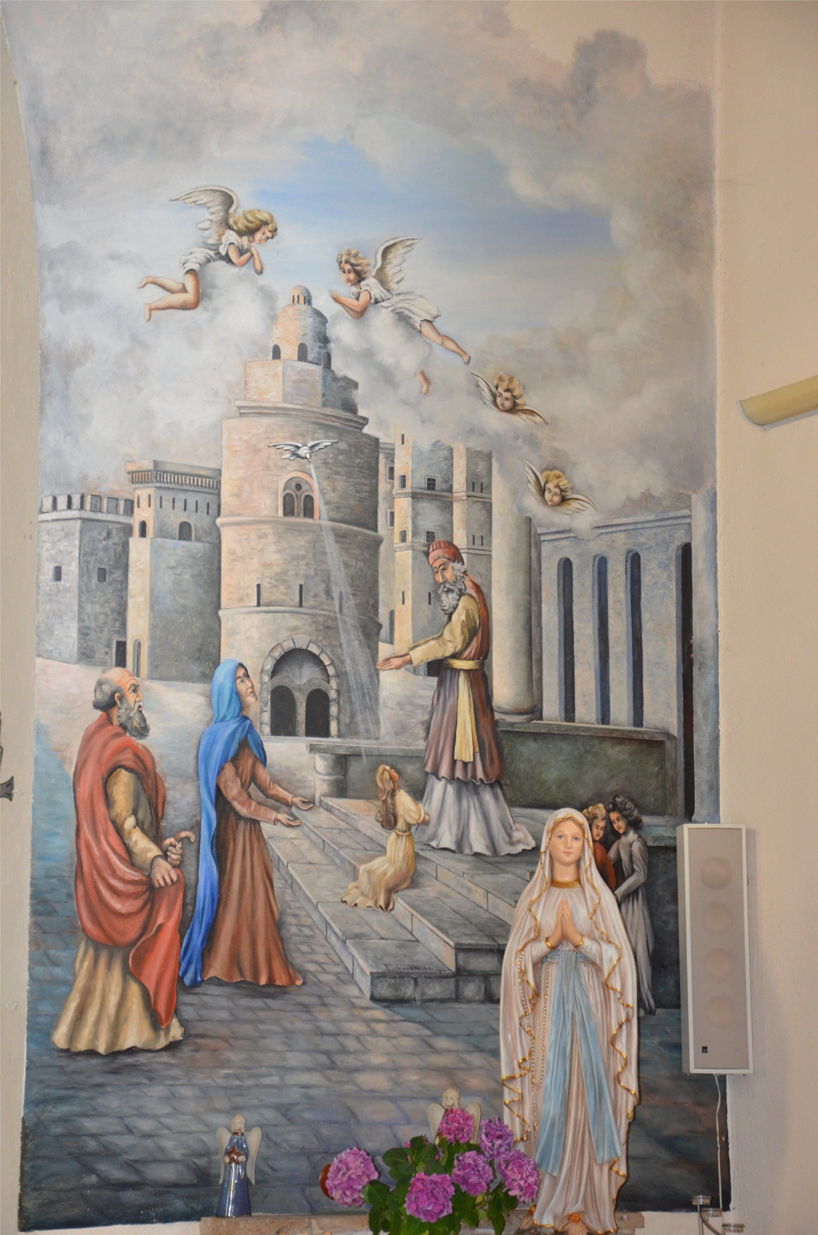 Fesque latérale de l'église de Christ-Roi de Fey, peinte par Firmin Fournier en 1953: la Vierge au temple.